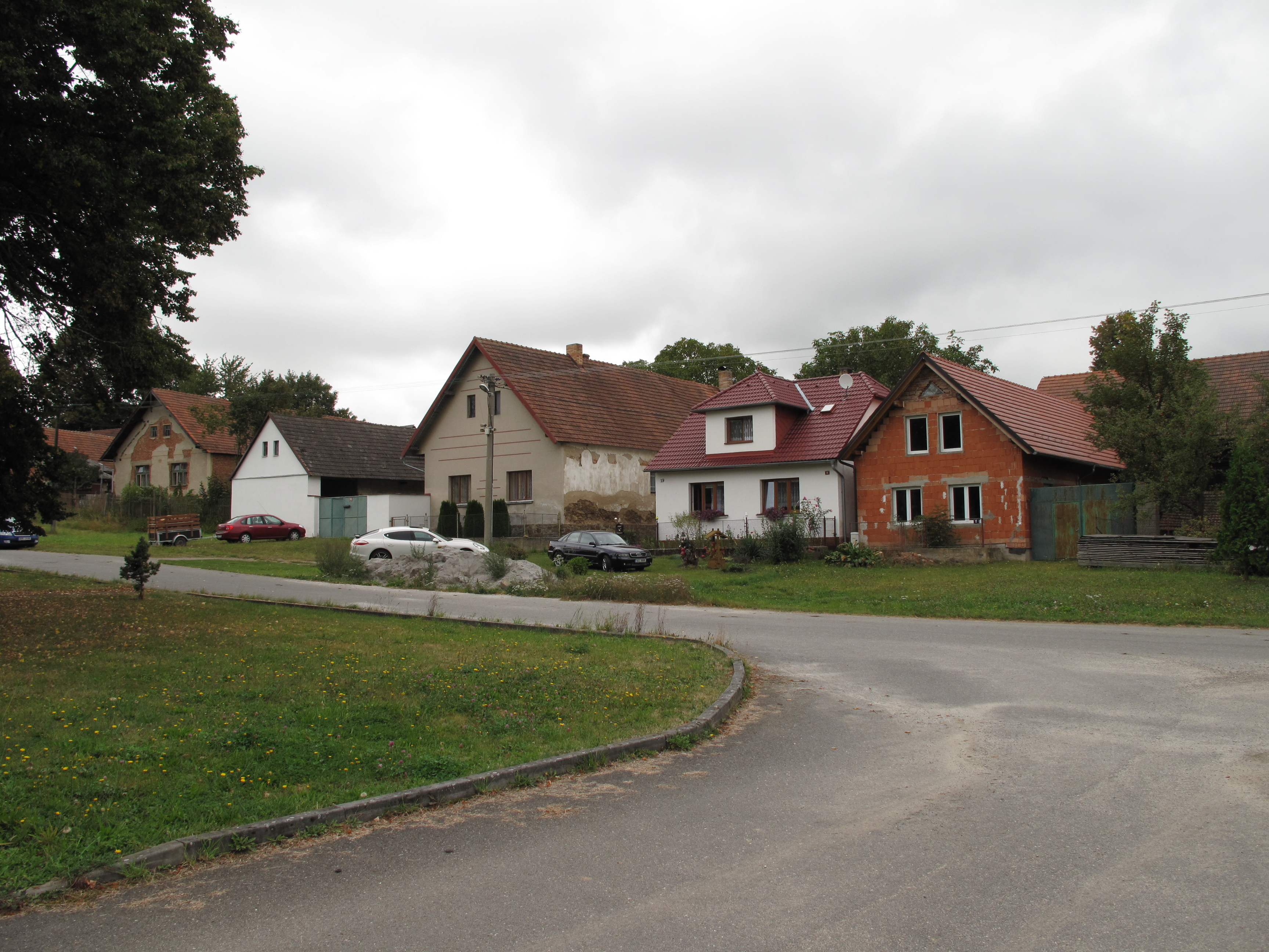 Domy ve Starém Smrdově. Okres Pelhřimov, Česká republika.